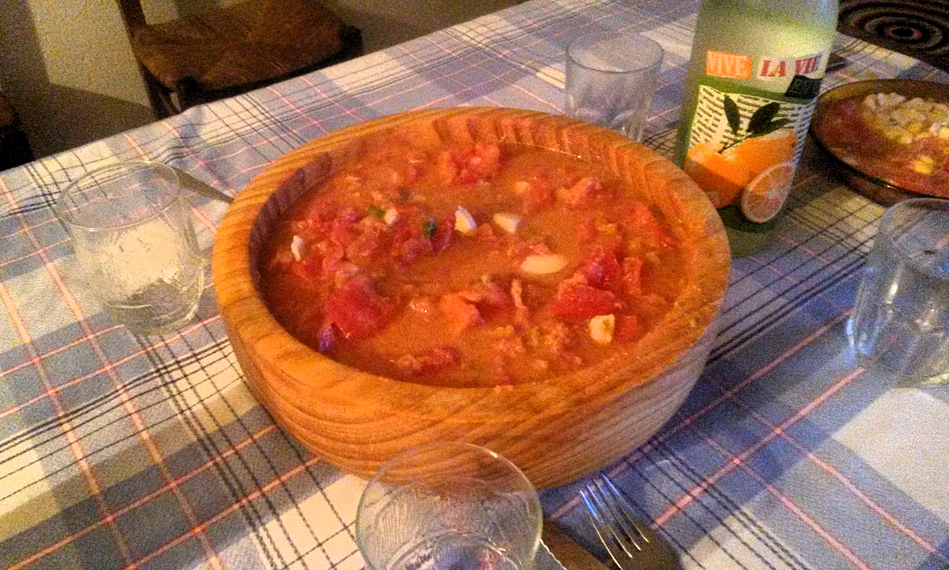 La pipirrana es una ensalada, presentada en un dornillo, cuyos ingredientes básicos son: cebolla, tomate, pimiento verde y pepino.